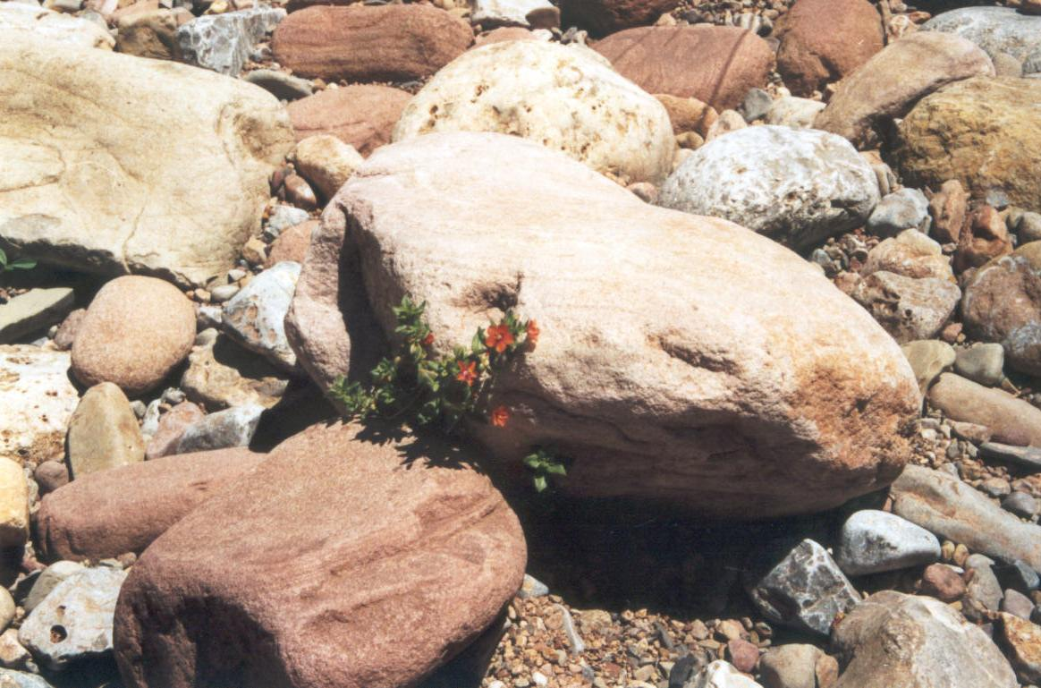 Una planta crece en el cauce seco de una rambla (Barranco de Olocau, Valencia) aprovechando la humedad retenida debajo de los bloques y grava. Autor: Fev. Fecha: mayo 2002